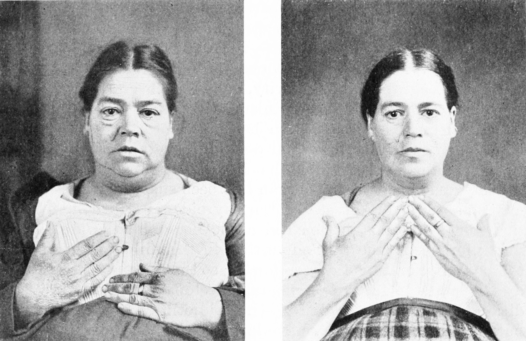 Myxoedema before and after treatment